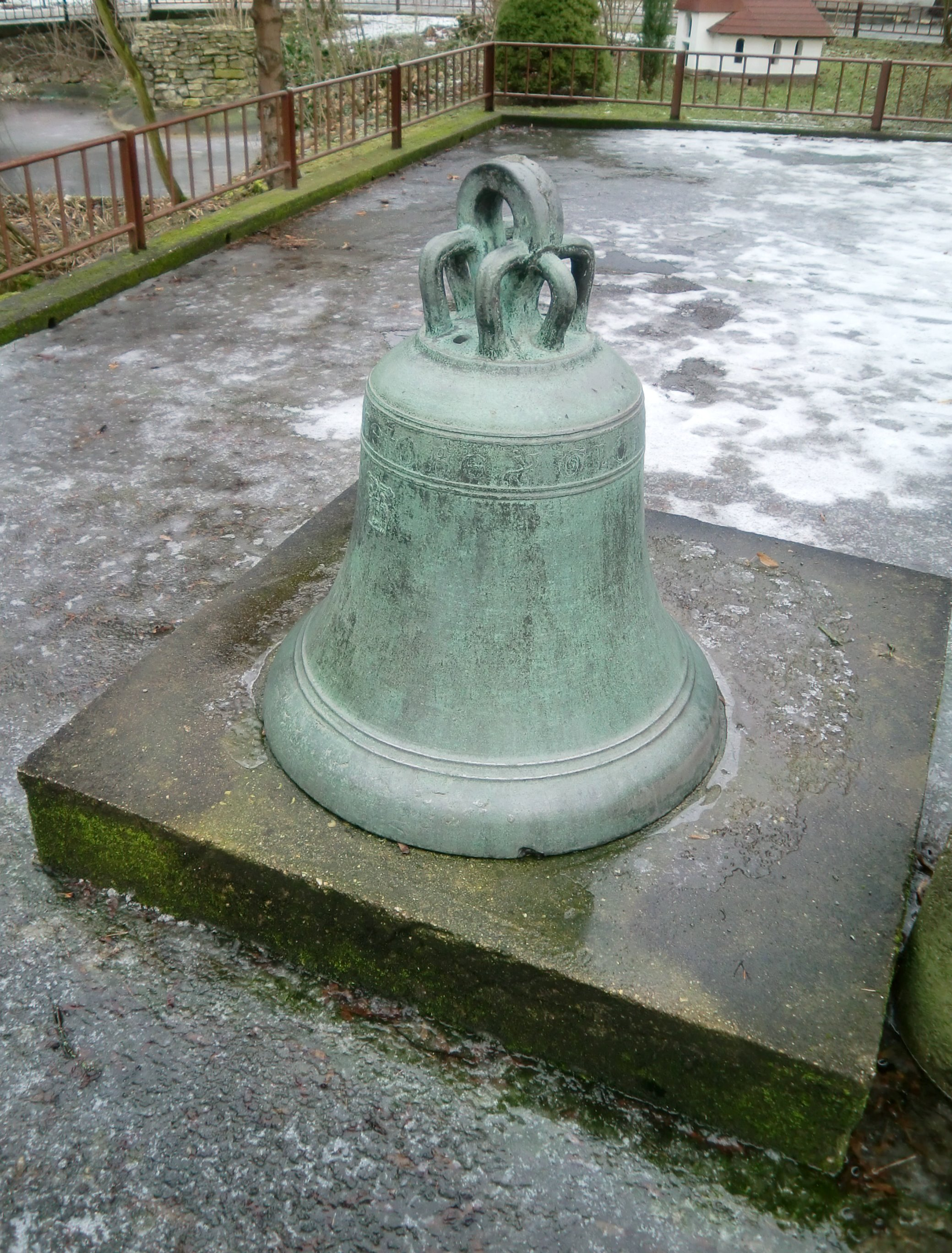 Glocke der Sankt-Johannis-Kirche im Tiergarten Staßfurt